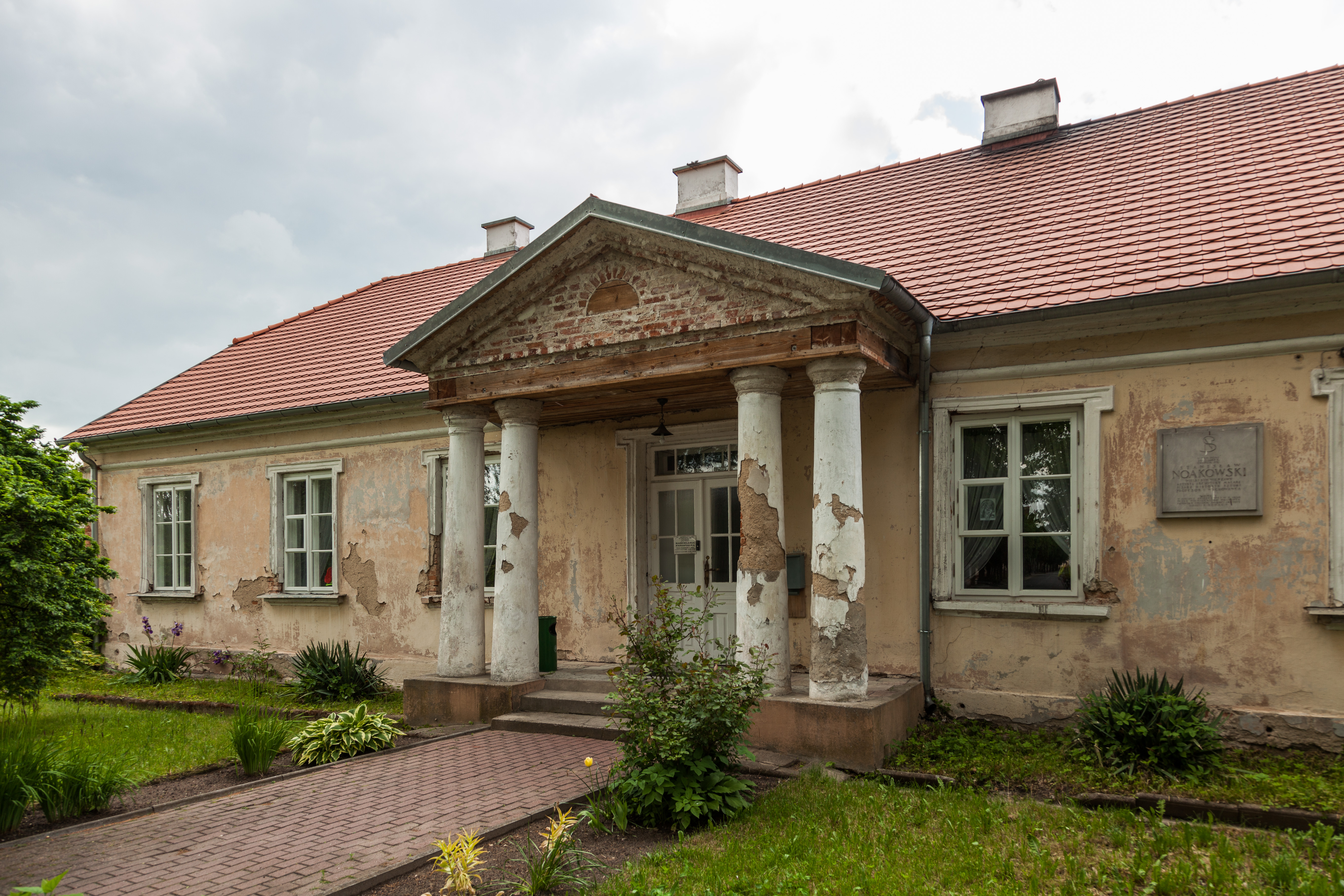 Plebania w Nieszawie, miejsce urodzenia Stanisława Noakowskiego. Stan z maja 2017 r.